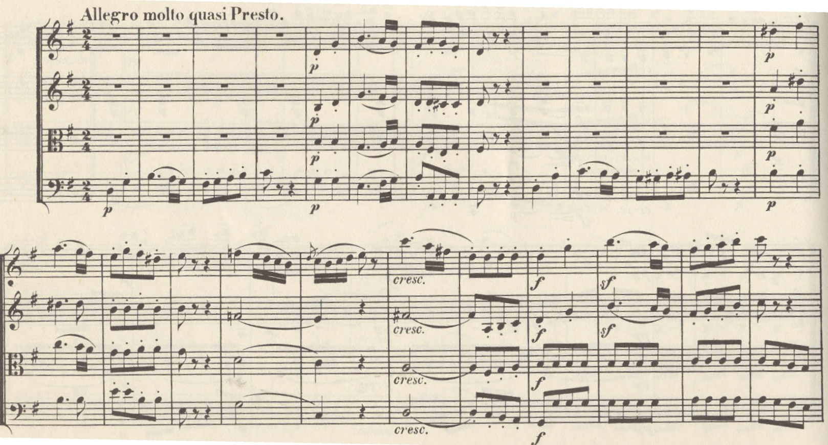 Partituur 2e strijkkwartet Beethoven 4e deel